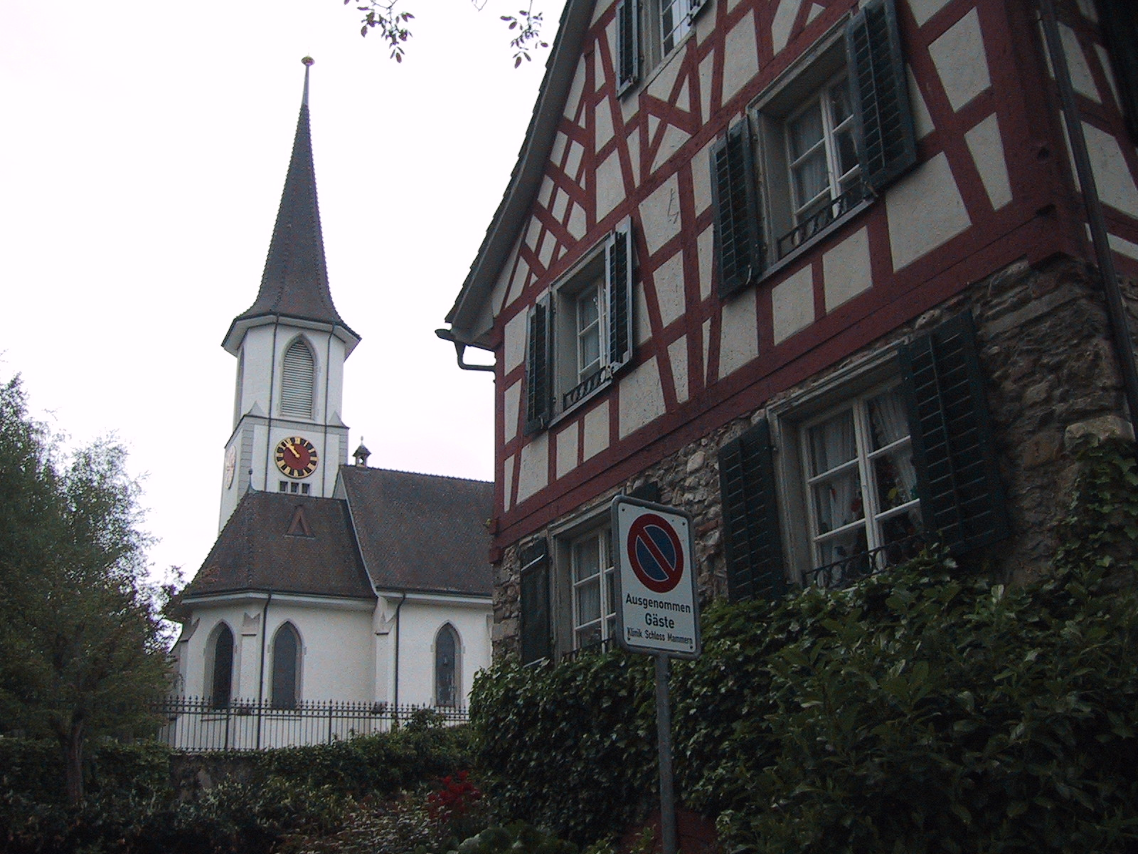 Katholische Kirche in Mammern